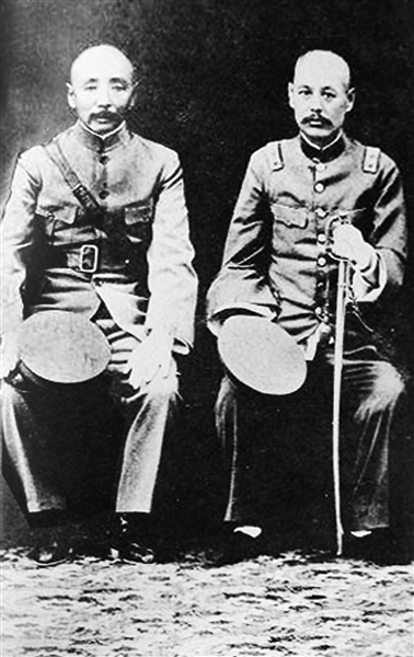 1926年张作霖（左）与吴佩孚在北京会谈“合作”。